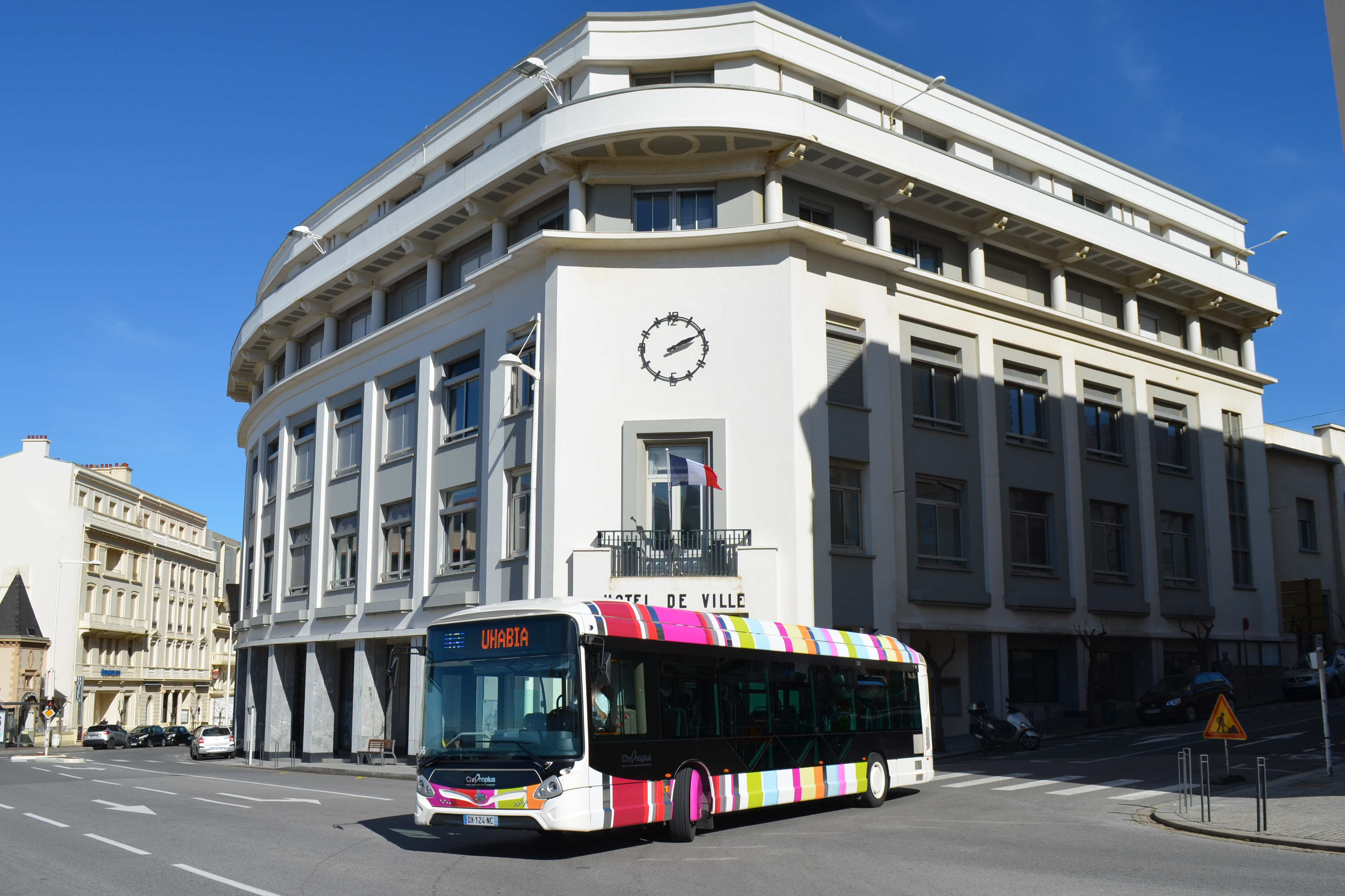 Bus de la ligne 13 du réseau Chronoplus devant la mairie de Biarritz.